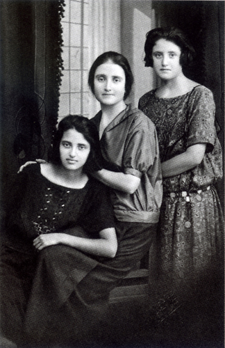 ציונה תג'ר במרכז עם שתי אחיותיה מרים ושושנה